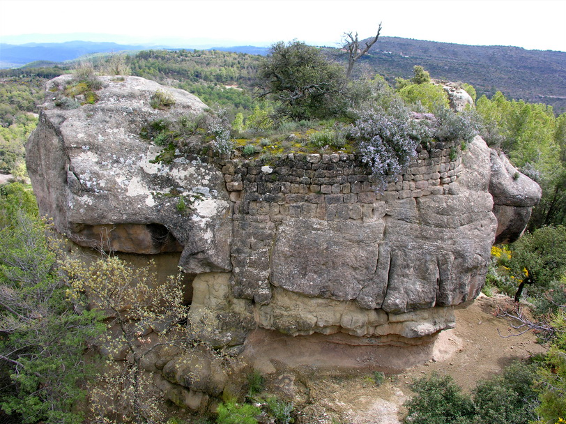 Vista d'un dels trams de muralla més ben conservat